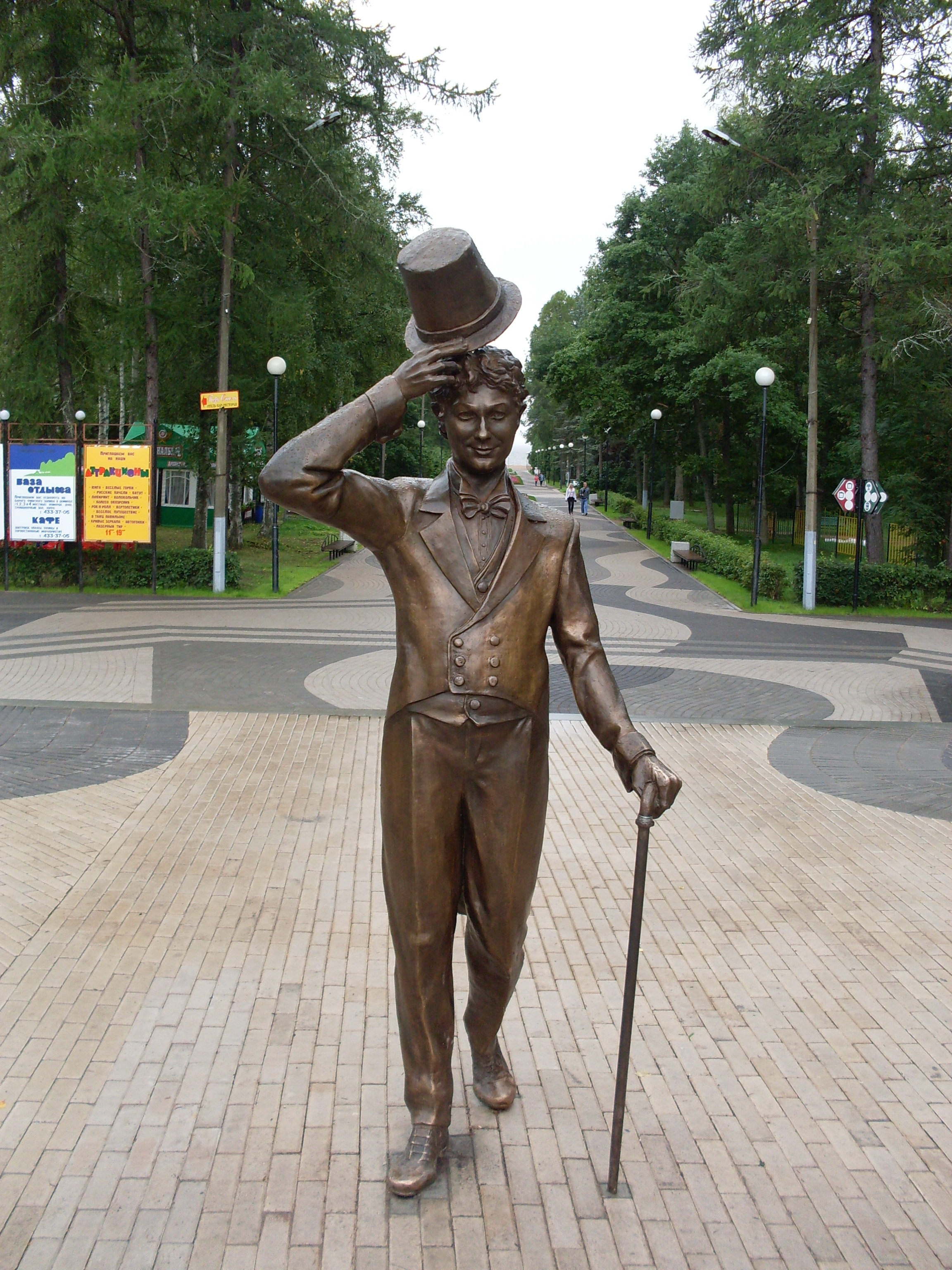 Памятник Вицину (Парк города Зеленогорск)